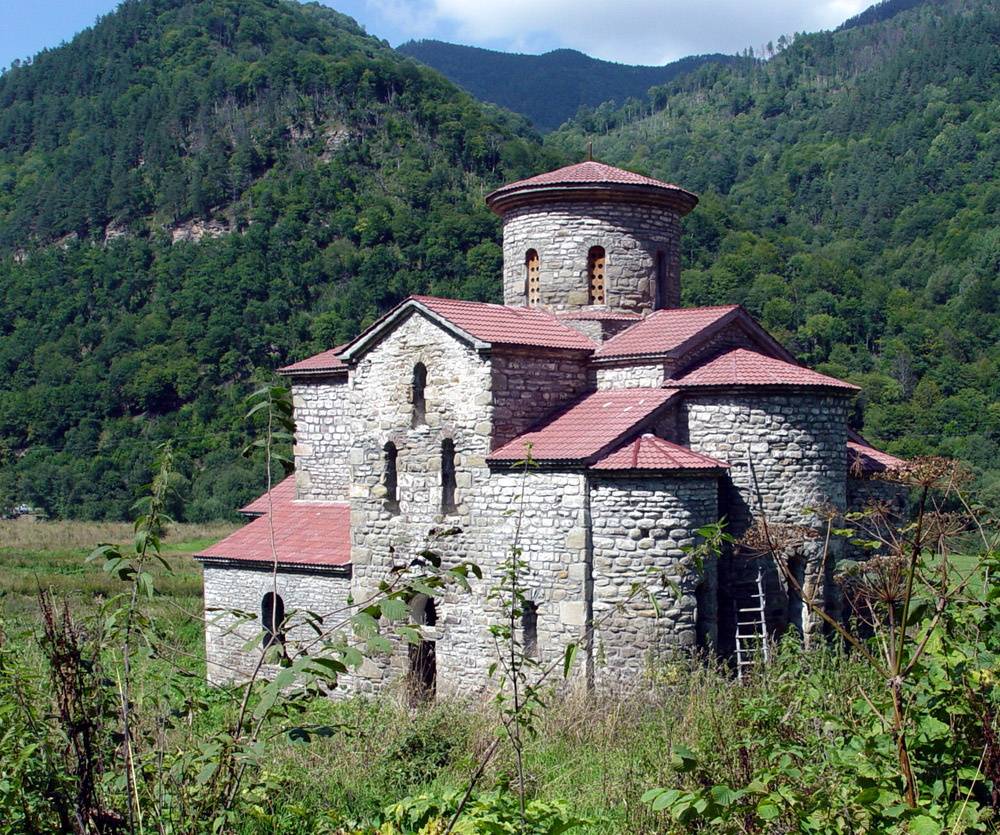 Средний Зеленчукский храм (Х в.) - Георгиевский кафедральный собор Аланской Епархии. Нижне-Архызский историко-архитектурный и археологический комплекс. Карачаево-Черкессия. Музей-заповедник. Снимок сделан с задней стороны. Къарачай-малкъар: Орта Зеленчук клиса (X ёмюр) — Алан Епархияны Геурге атлы кафедрал клисасы. Тёбен Архыз тарих-архитектуралыкъ эмда археологиялыкъ комплекс. Къарачай-Черкесия. Сурат арт джанындан этилгенди.